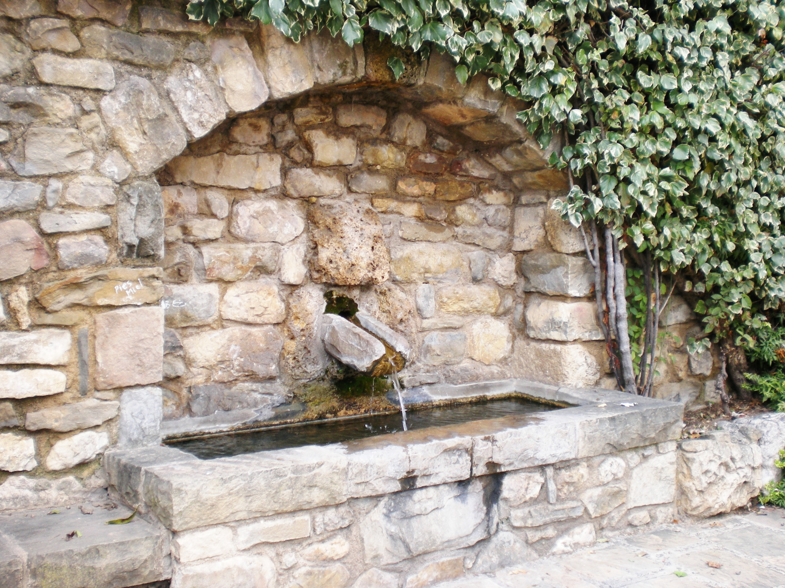 Font de la plaça de la Canal, a la vila de Sant Llorenç de Morunys (Solsonès)